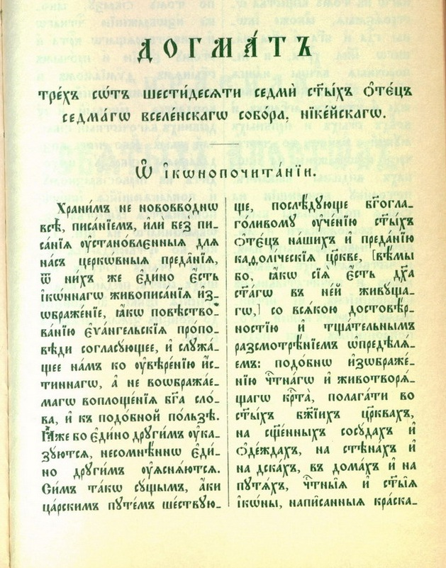 Догмат о иконопочитании. Книга Правил.